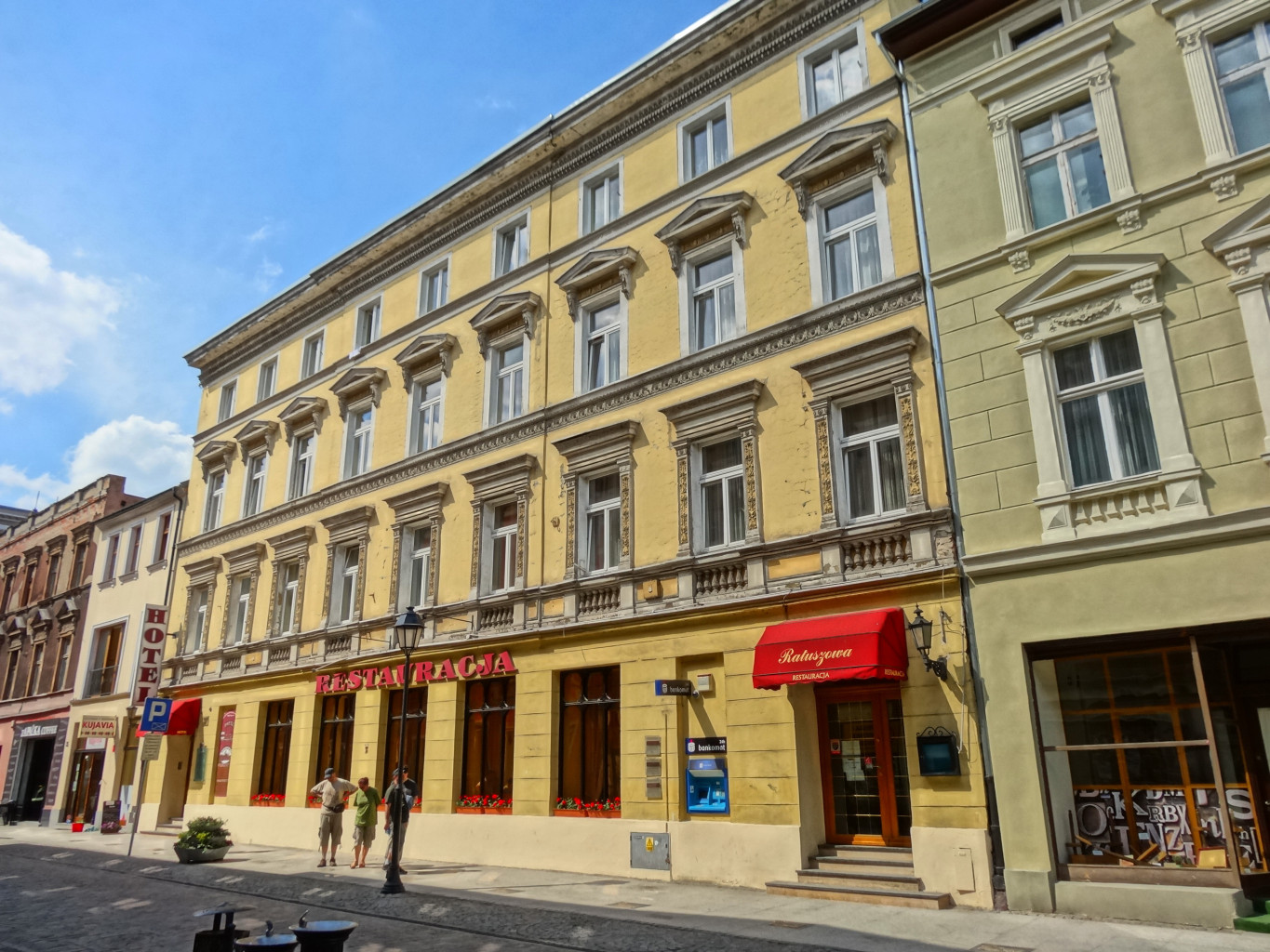 Hotel Ratuszowy (**) przy ul. Długiej 37 w Bydgoszczy